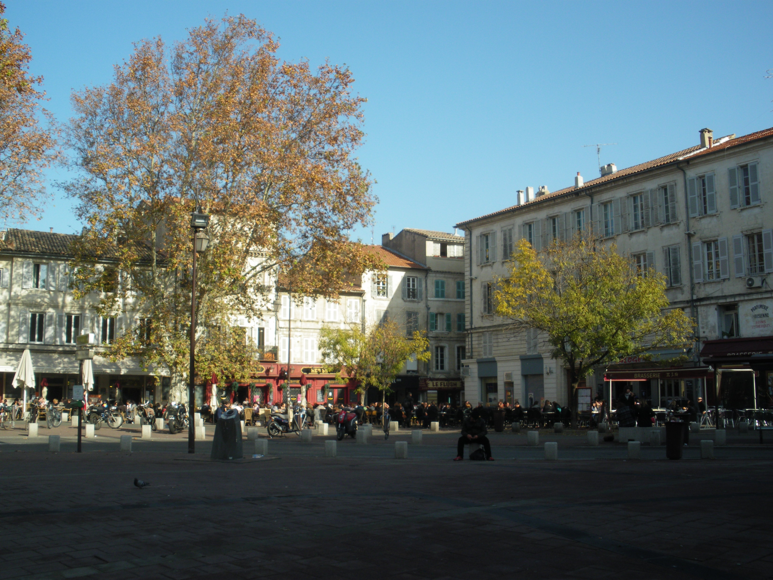 Place Pie, à Avignon